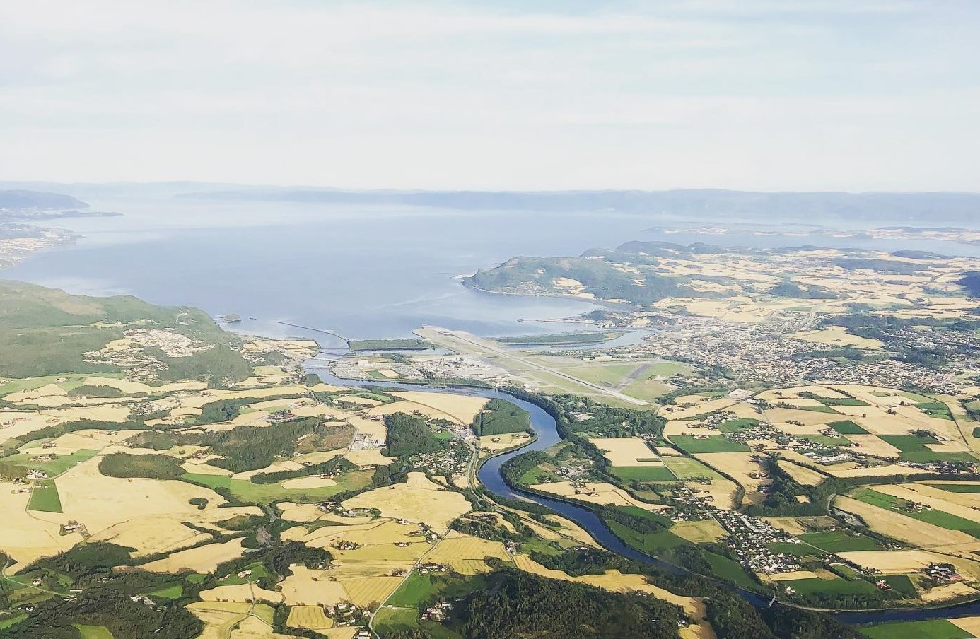 De nedre delene av Stjørdal. Lånke til venstre, Stjørdalselva midt i bildet, Værnes og Stjørdalshalsen til høyre, og Skatval ute til høyre. Flyfoto fra øst.